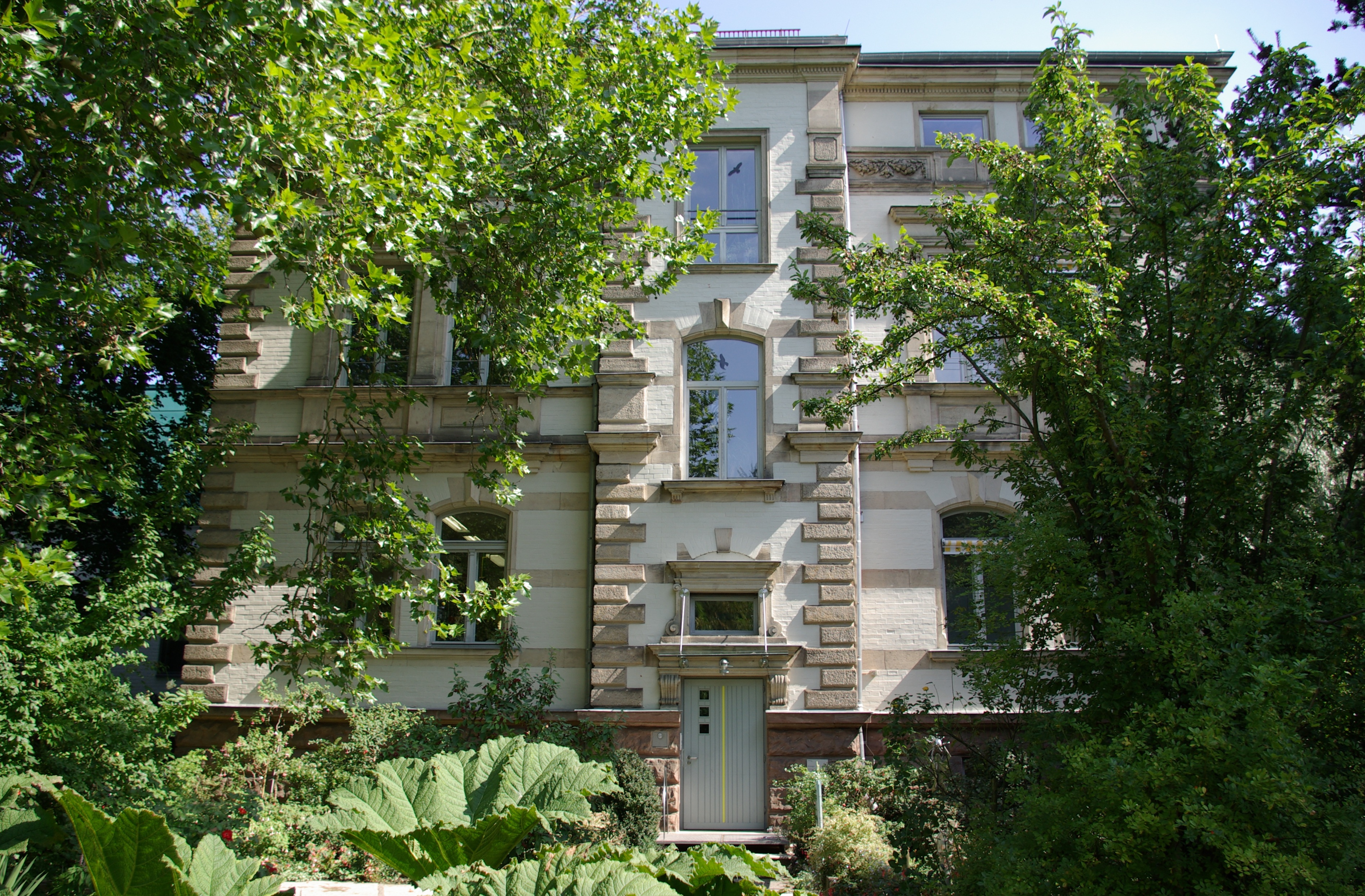 Institut für Klinische und Molekularische Virologie der Friedrich-Alexander-Universität im Botanischen Garten Erlangen, früher Botanisches Institut, Architekt: Friedrich Wilhelm Scharff, Baujahr: 1890-1892